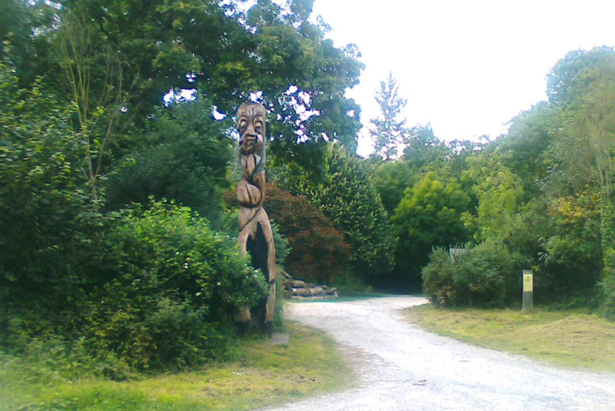 Totem de la vallée du Perrier à Kermoroc'h,"L'esprit de la tempête", oeuvre de l'artiste Richard Ruffel (1981)